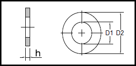 ISO 7089